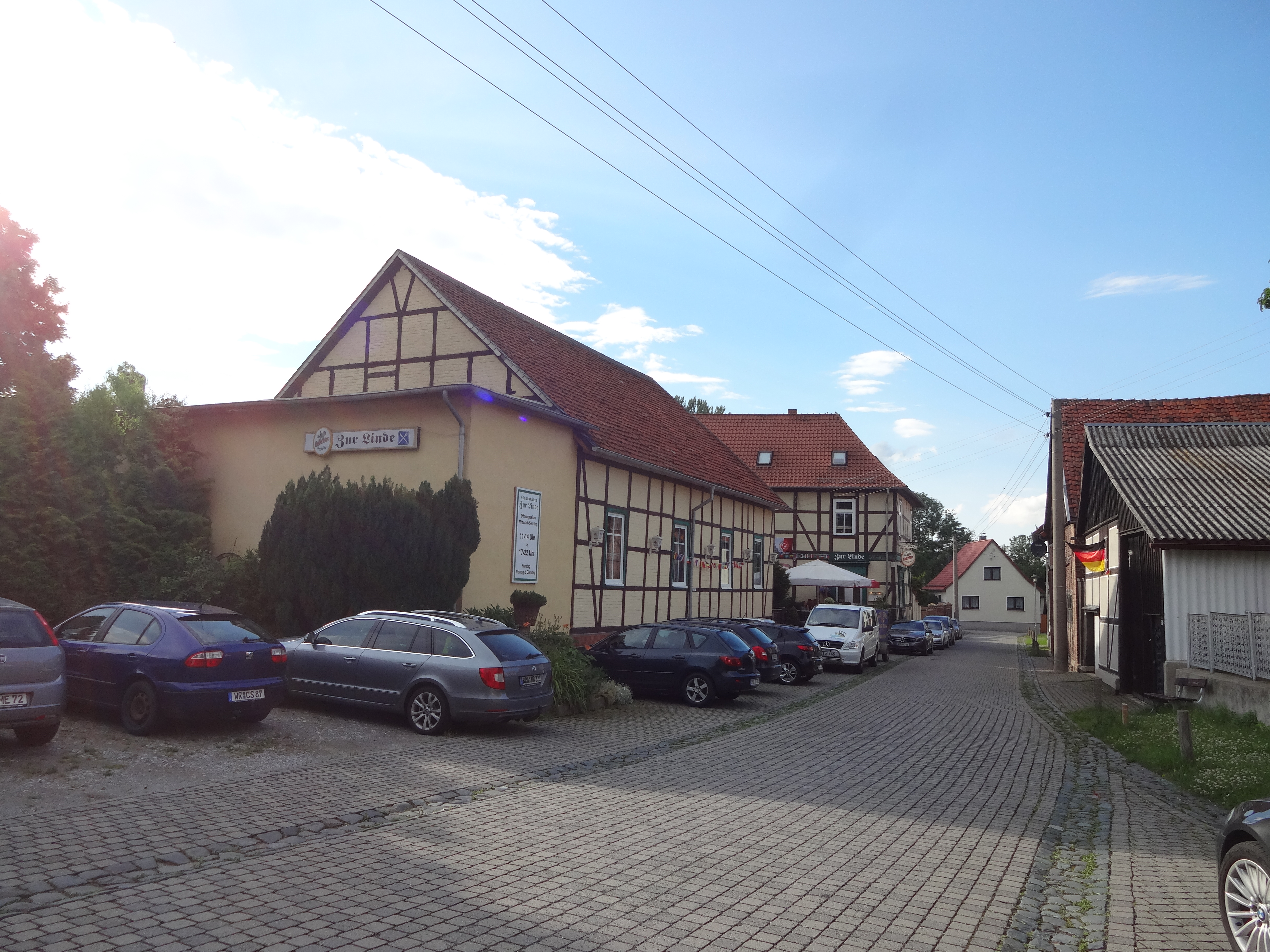 denkmalgeschützter Gasthof in der Straße Unter der Linde 6, 7 in Silstedt